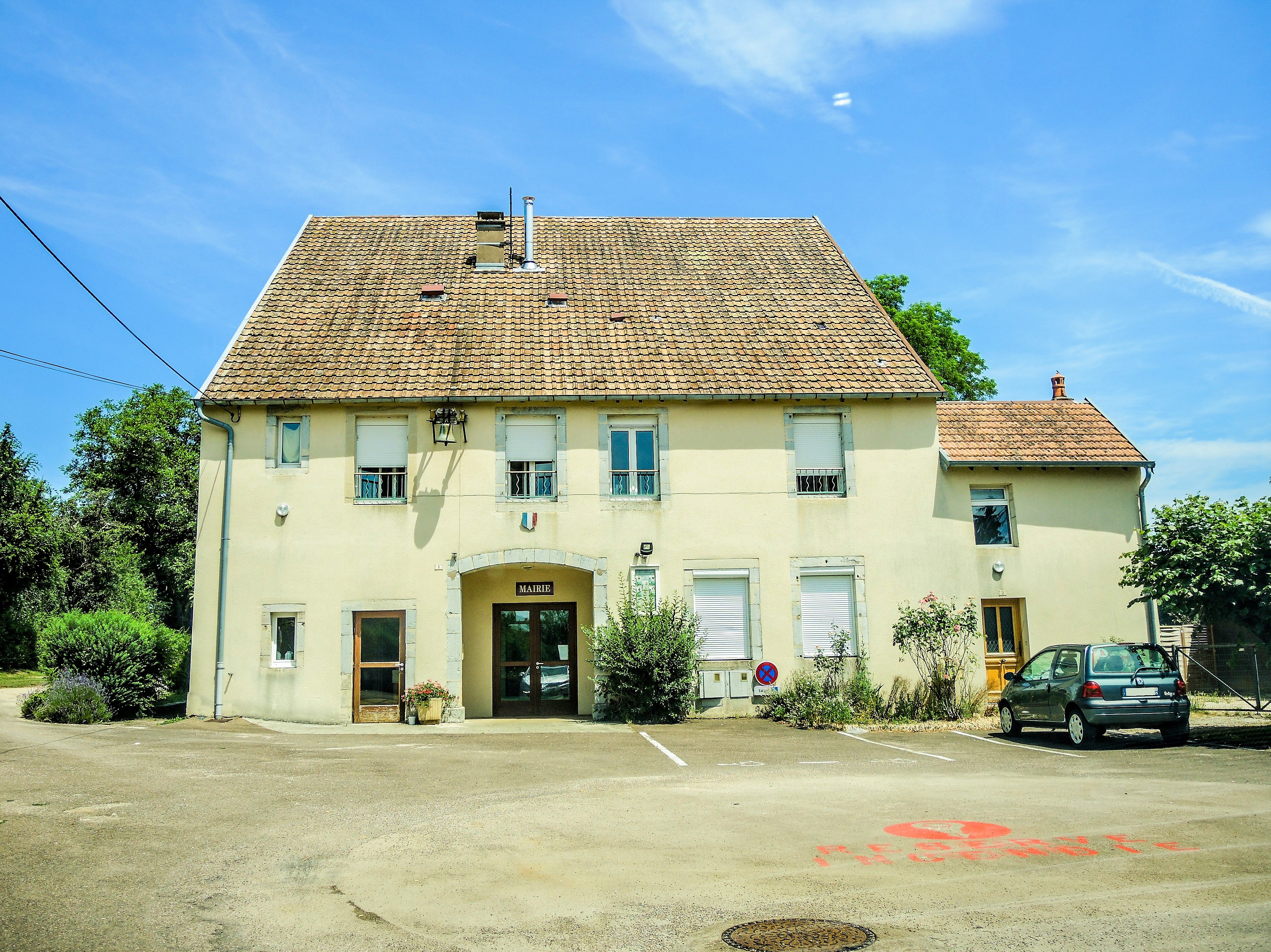 Mairie